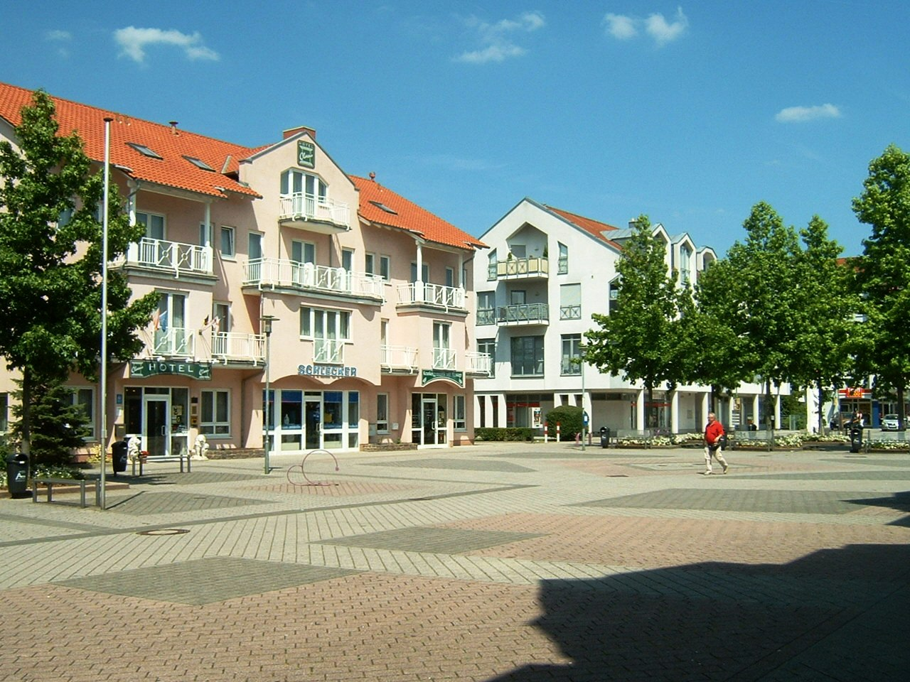 Geschwister-Scholl Platz in Nilkeim